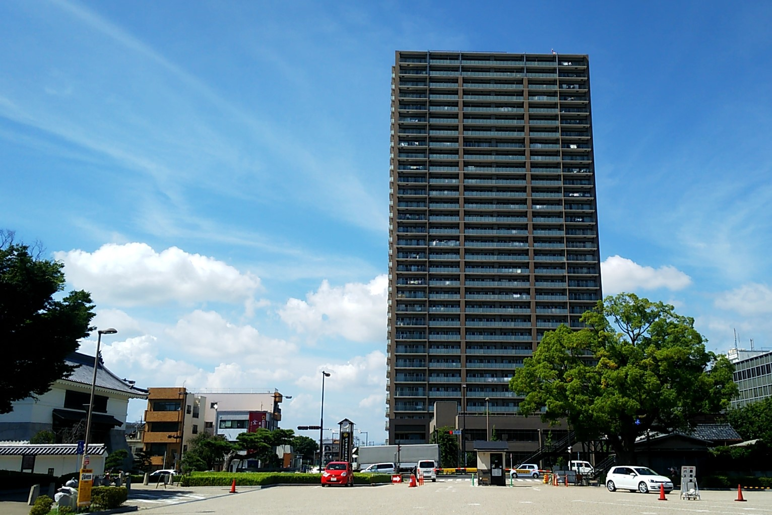 岡崎タワーレジデンス